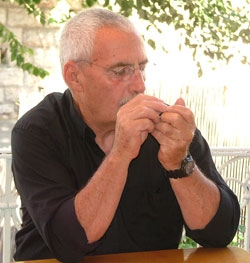 Dr. Gabriel Mazor